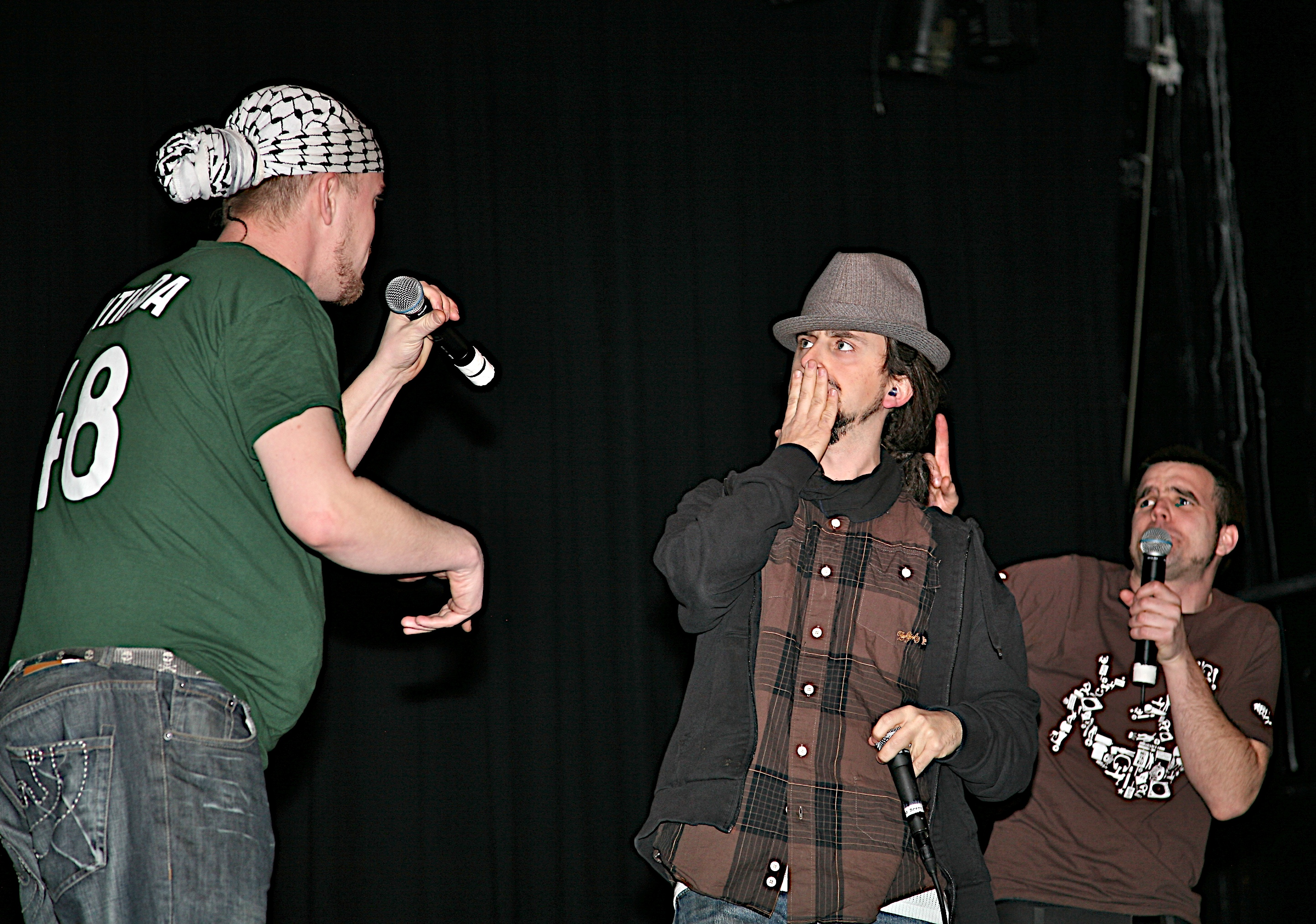 Gatas Parlament